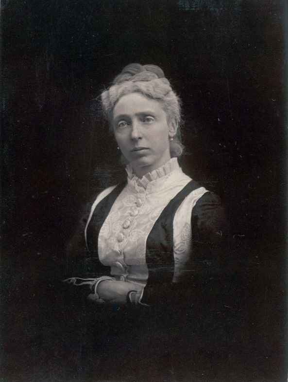 Elisabetta di Sassonia